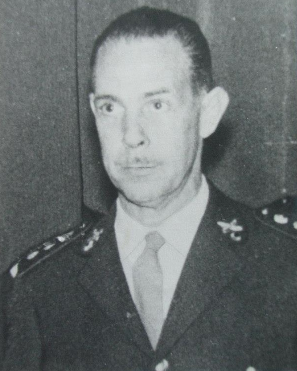 Wilde Santa Cruz es un ex militar argentino, que alcanzó la jeraquía de Coronel. Ocupó durante 63 días el cargo de interventor federal y Gobernador de facto de Misiones, del 24 de abril al 25 de junio de 1962, durante la presidencia de José María Guido, que asumió las funciones de los poderes ejecutivo y legislativo como resultado del golpe militar del 29 de marzo de 1962 que derrocó y detuvo al Presidente Arturo Frondizi. Santa Cruz derrocó al entonces gobernador democrático de Misiones, el Dr. César Napoleón Ayrault.